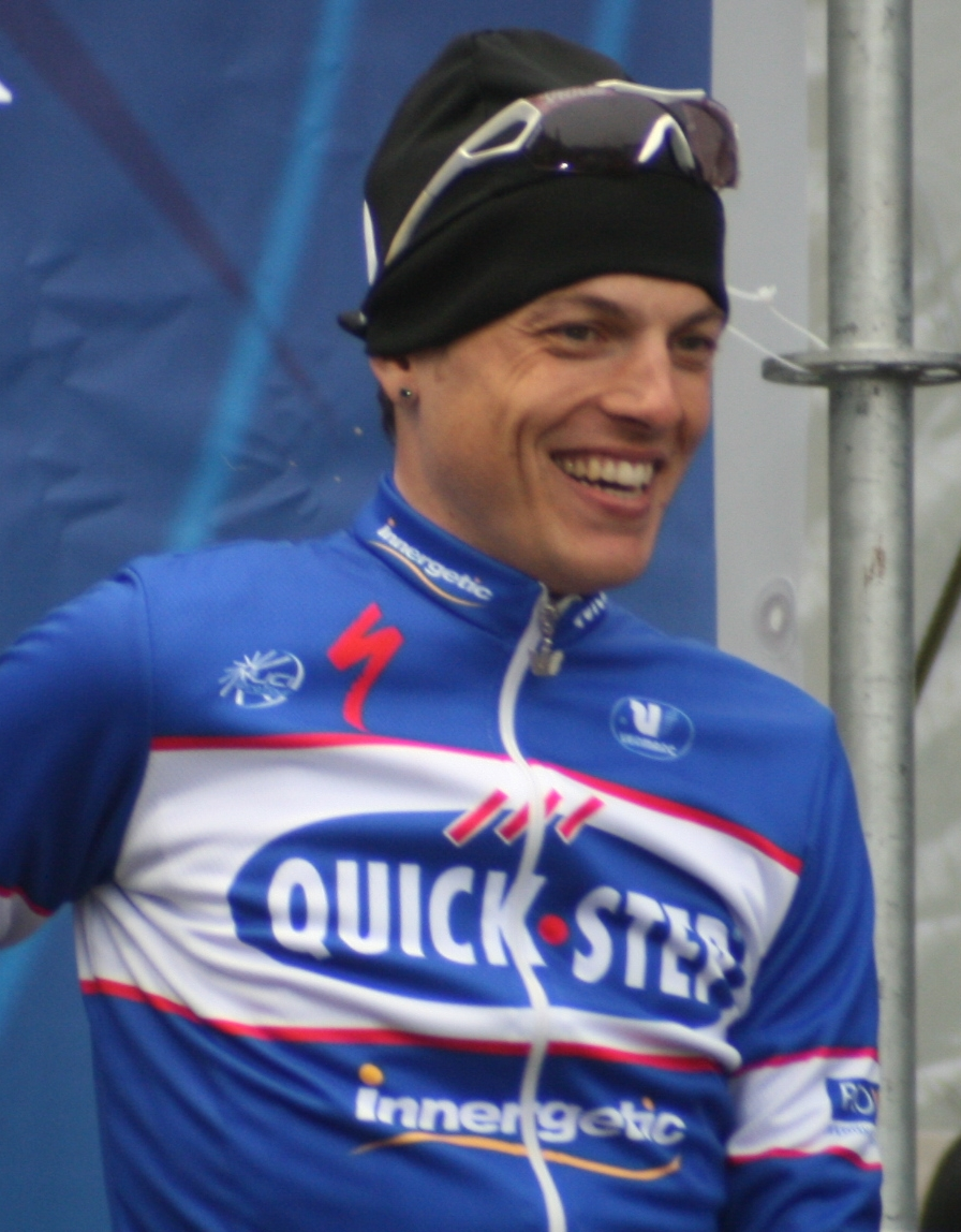 Kevin De Weert au départ du Tour des Flandres 2009